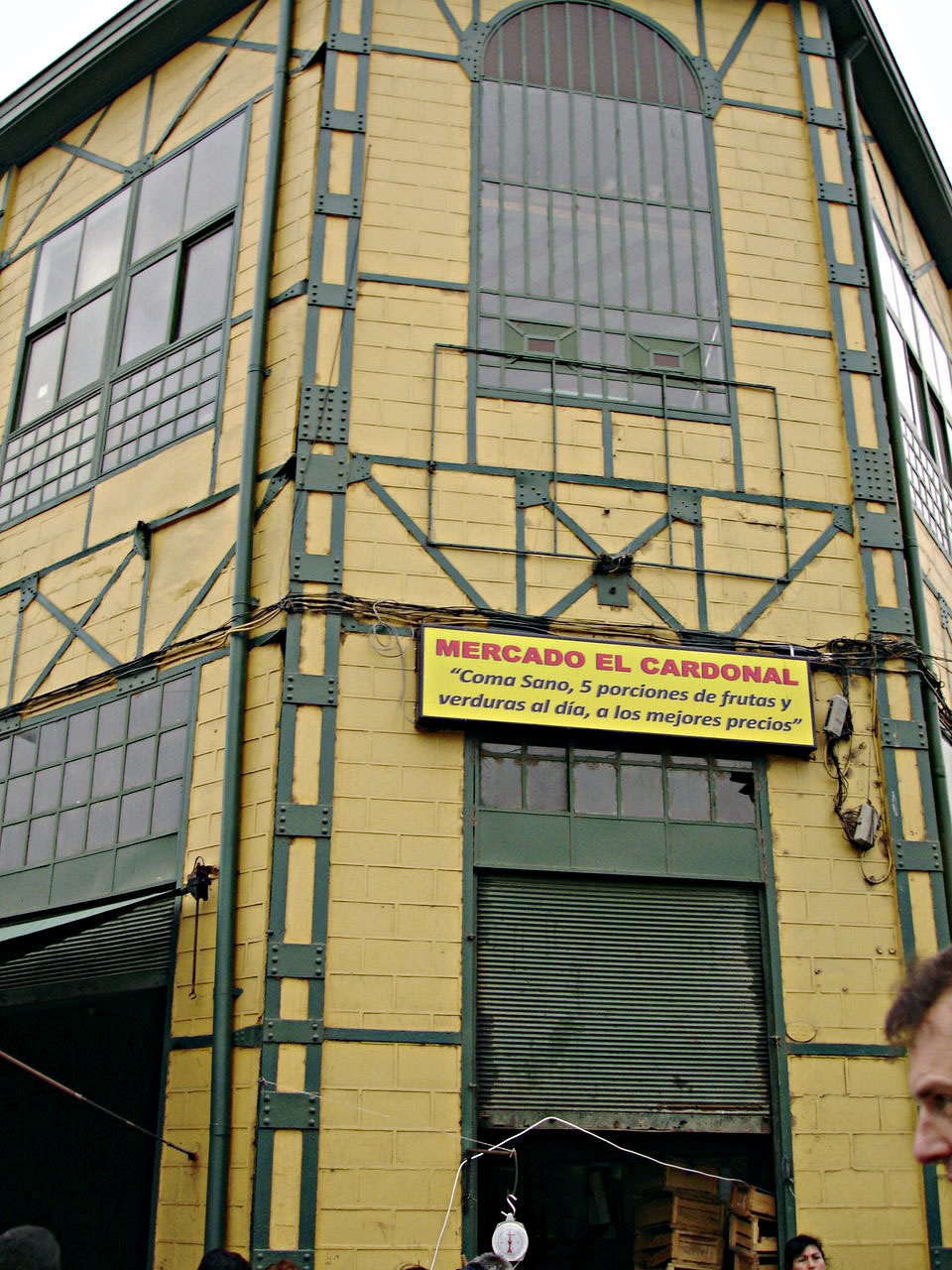 Mercado El Cardonal. Valparaíso.